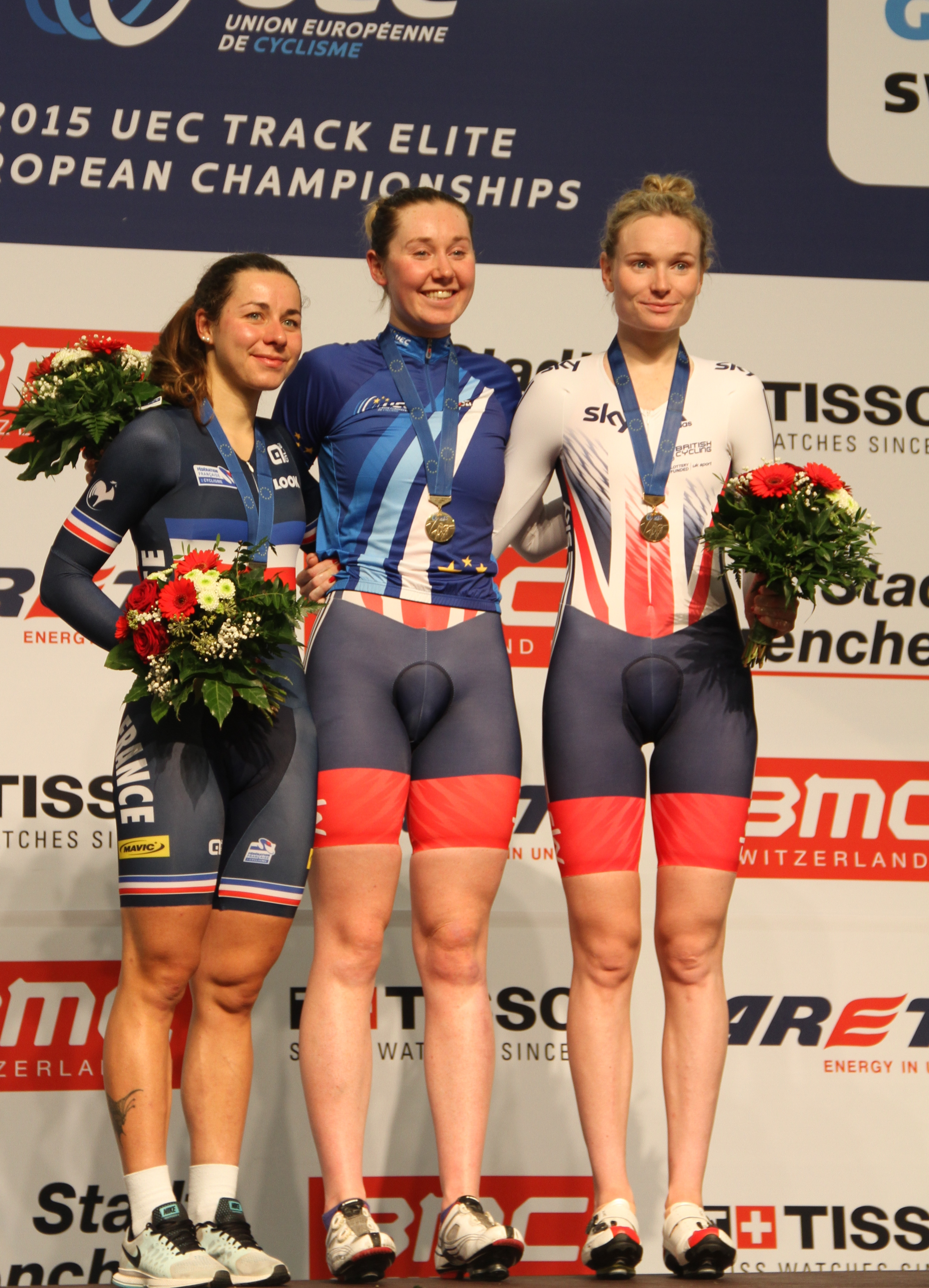 Podium Einerverfolgung Frauen (v.l.n.r.): Élise Delzenne, Katie Archibald, Ciara Horne The making of this document was supported by the Community-Budget of Wikimedia Germany.